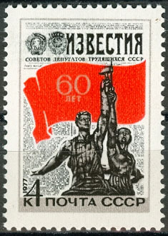 Почтовая марка